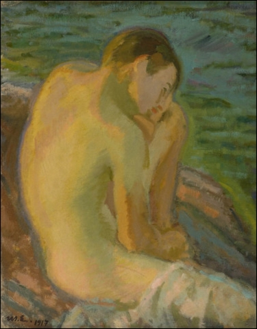 Poika rannalla (59 x 47 cm)